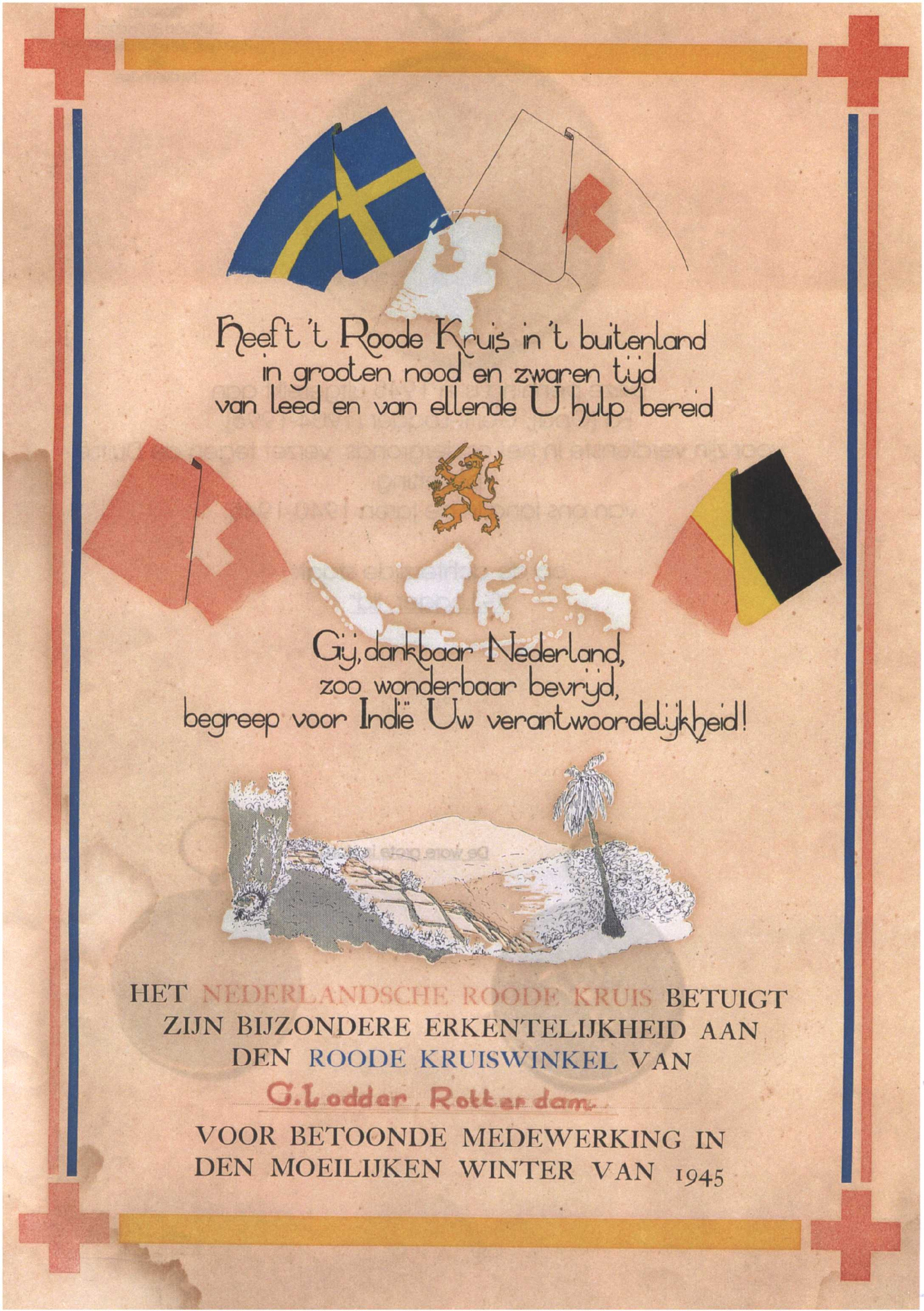 VTer beschikking gesteld door A. Lodder - Rotterdam. Toegekend aan zijn vader wiens kruidenierszaak in die periode als Rode Kruiswinkel werd aangewezen t.b.v. de distributie van Zweeds witbrood